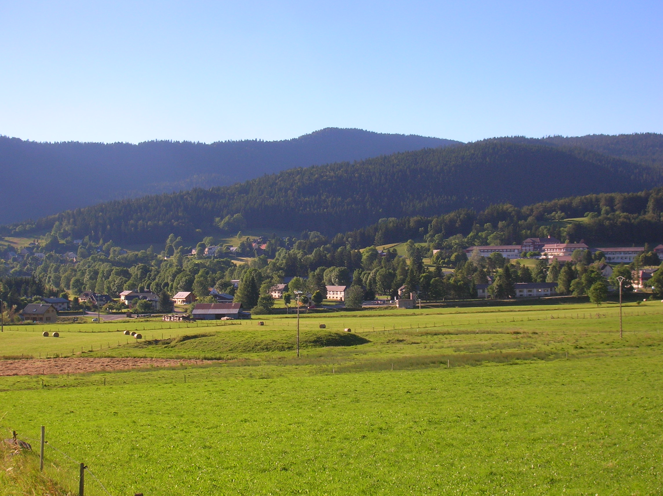 motte castrale de Autrans, Isère, France.